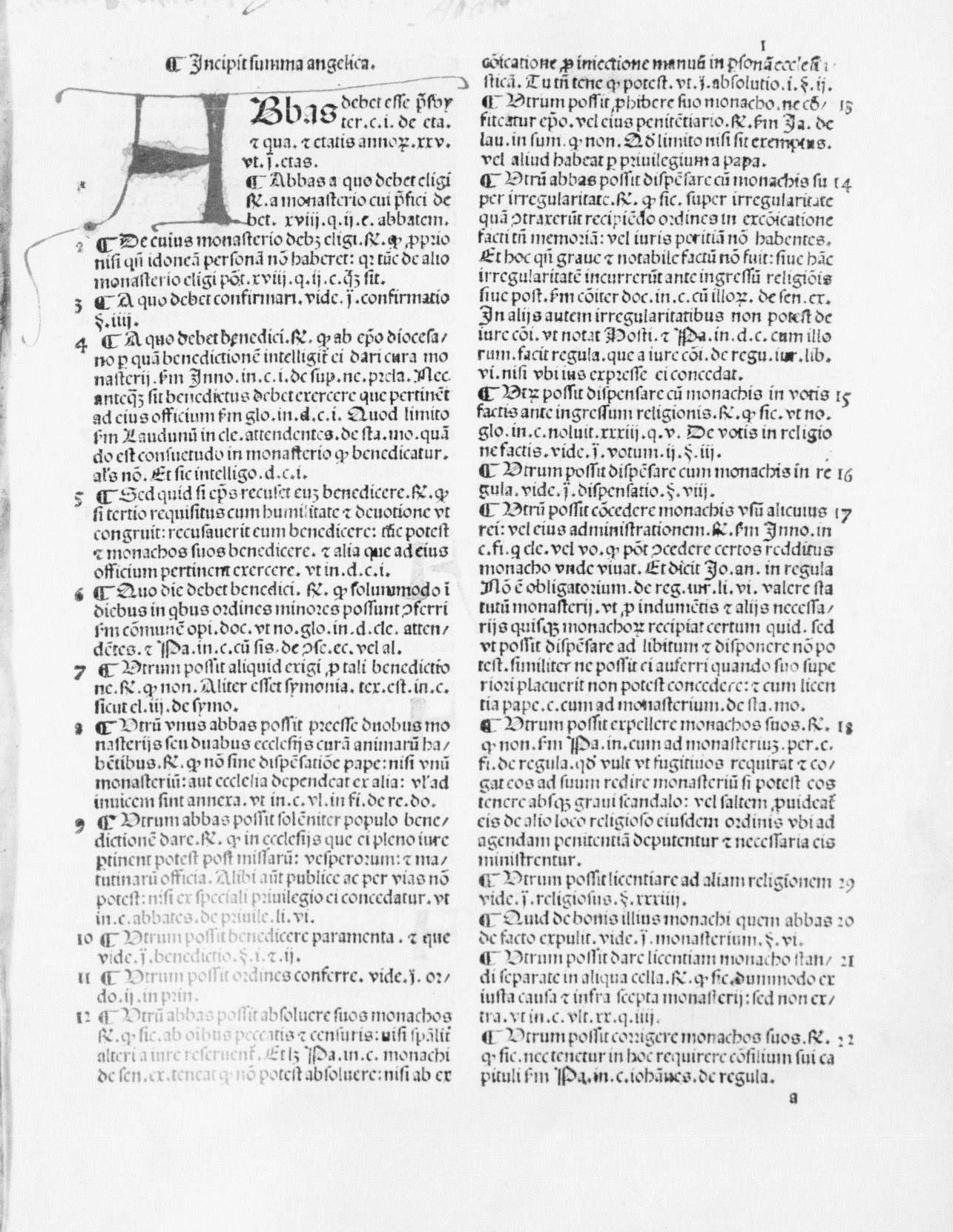 Frontespizio